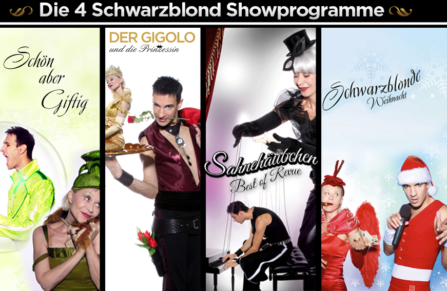 Seit 2004 gibt es das Glamour Pop Entertainment Duo Schwarzblond, bestehend aus Monella Caspar und Benny Hiller. Die originellen Originale aus Berlin haben mit Ihrer Art von "Glamour Pop Entertainment" eine ganz eigene Schublade kreiert. Der vier Oktaven Gesang von Benny Hiller und die elfenartige Babydoll Stimme von Monella Caspar bewegen sich in Dimensionen, die kontrastreicher nicht sein könnten. Songs zwischen Gänsehaut und Herzprickeln, Pop und Rock, Chanson und Kabarett lassen keine Gefühlsregung aus. Das Ganze präsentiert in ständig wechselnder, von Monella Caspar selbstentworfener Haute Couture und extravaganten Hutkreationen, die in ihrer Exklusivität und Einzigartigkeit ihres Gleichen suchen und einen Hauch von Revuecharakter aufkommen lassen.